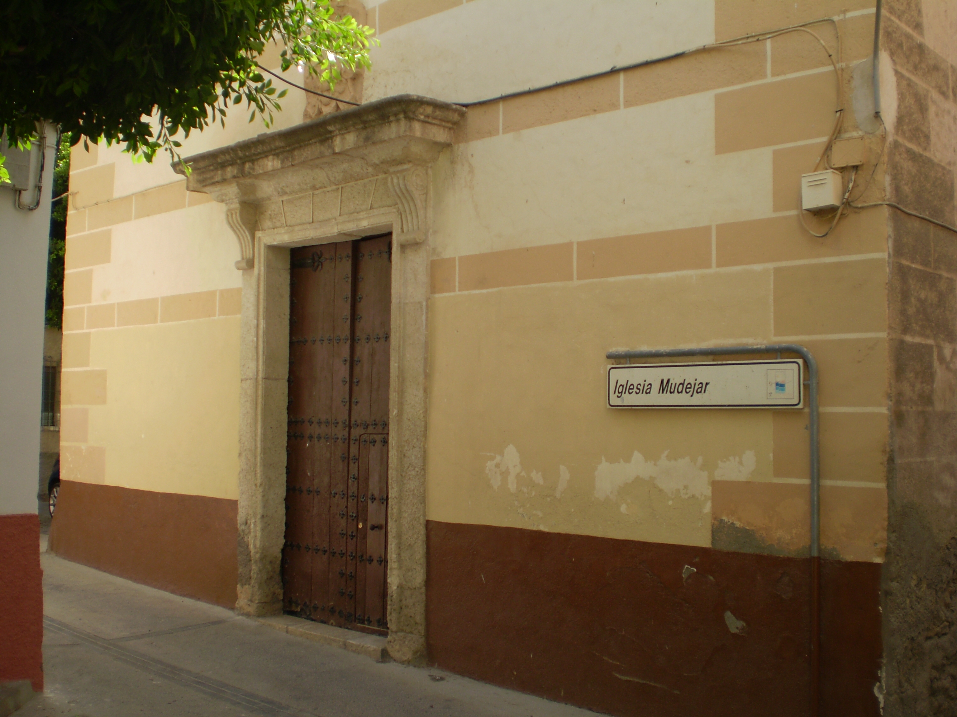 fachada principal de la Iglesia de Nuestra Señora de la Anunciación de Huécija (Almería-España)